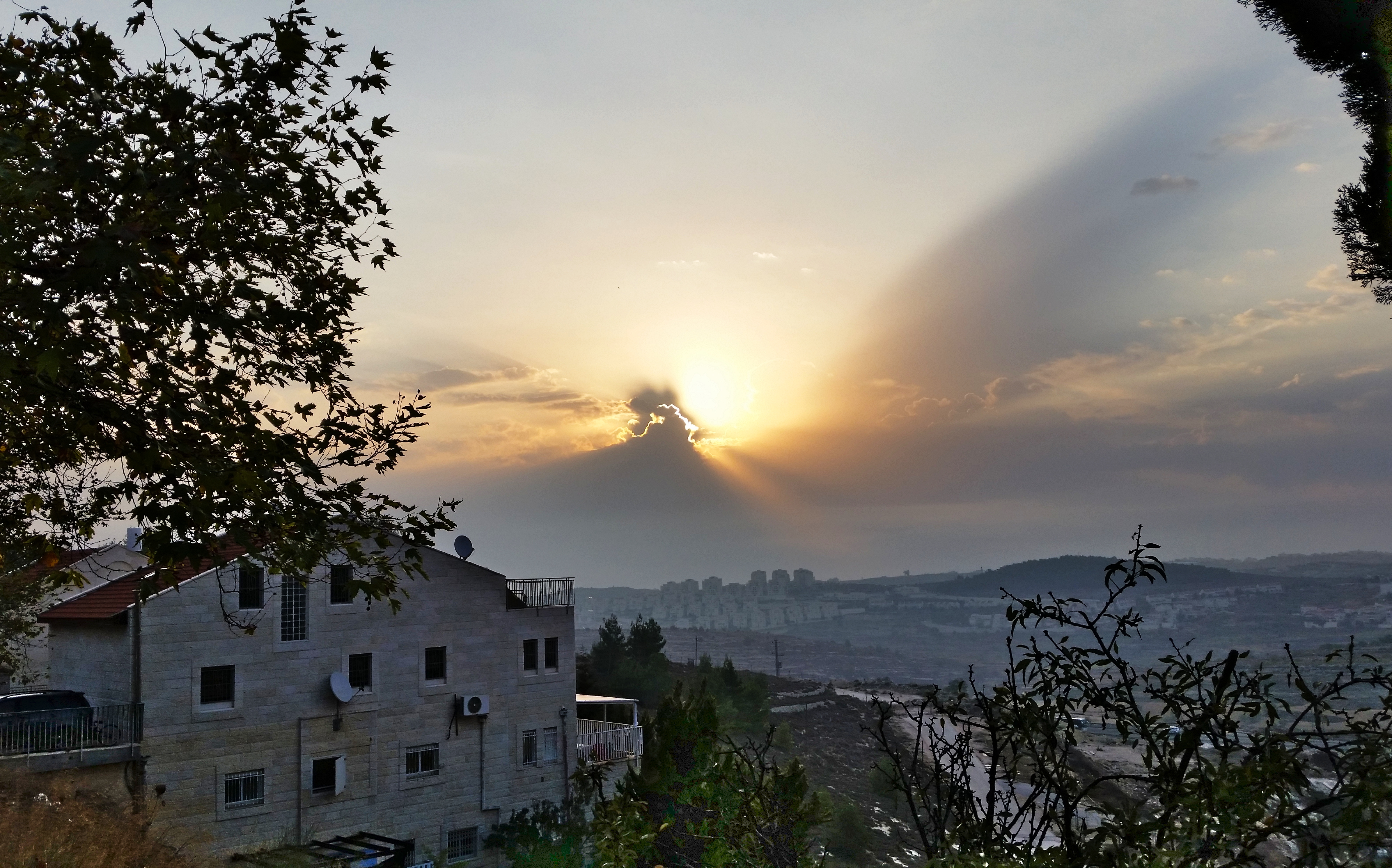 over Efrat